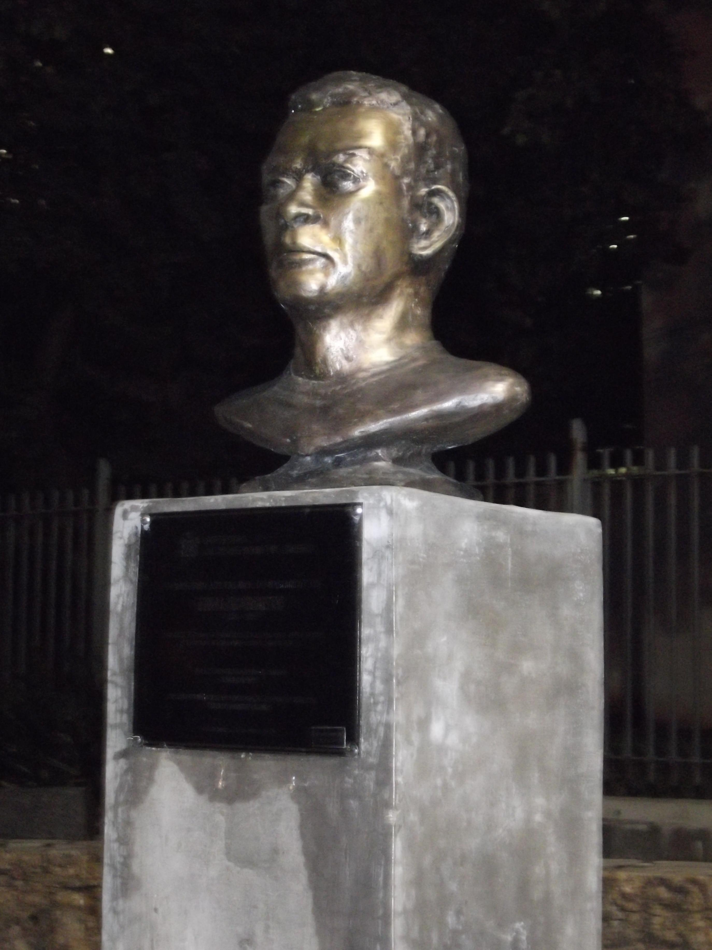 Busto do escritor Lima Barreto (cidade do Rio de Janeiro, Brasil)